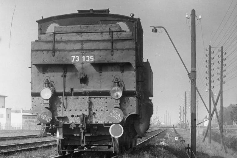 Keine Eisenbahnunglücke mehr durch optische Zugbeeinflussung! Der optische Spiegel an einer Telegrafenstange befestigt, um im Notfalle den Zug auch vor dem Signal zum Halten zu bringen.